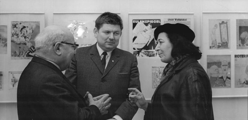 Zentralbild-Brüggmann 27.4.70 Berlin: Kunstausstellung "Assoziation Revolutionäre Bildender Künstler" eröffnet Anläßlich des VI. Verbandskongresses der Bildenden Künstler wurde am 27.4.70 im Alten Museum eine Kunstausstellung eröffnet. Während eines ersten Rundgangs v.l.n.r. : der Mitbegründer der ASSO, Sandor Ek, Grafiker und Karikaturist; Dr. Arno Hochmuth, Leiter der Abteilung Kultur beim ZK der SED, und die Präsidentin des Verbandes Bildender Künstler der DDR, Prof. Lea Grundig im angeregten Gespräch.